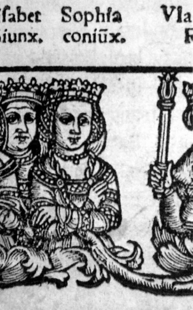 Беларуская (тарашкевіца): Партрэт Соф’і Гальшанскай (Sofja Halšanskaja)